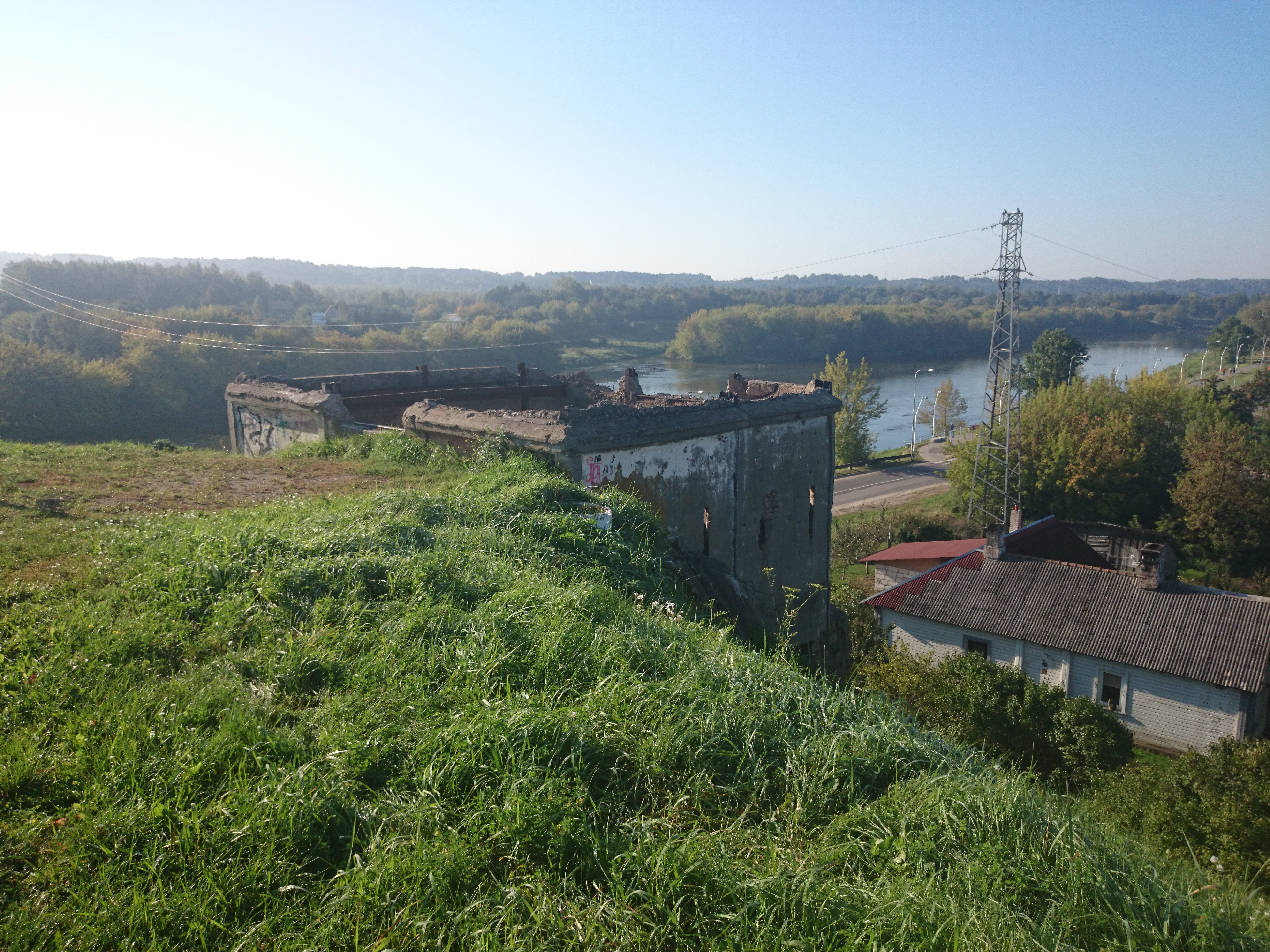 Jonava railway bunker